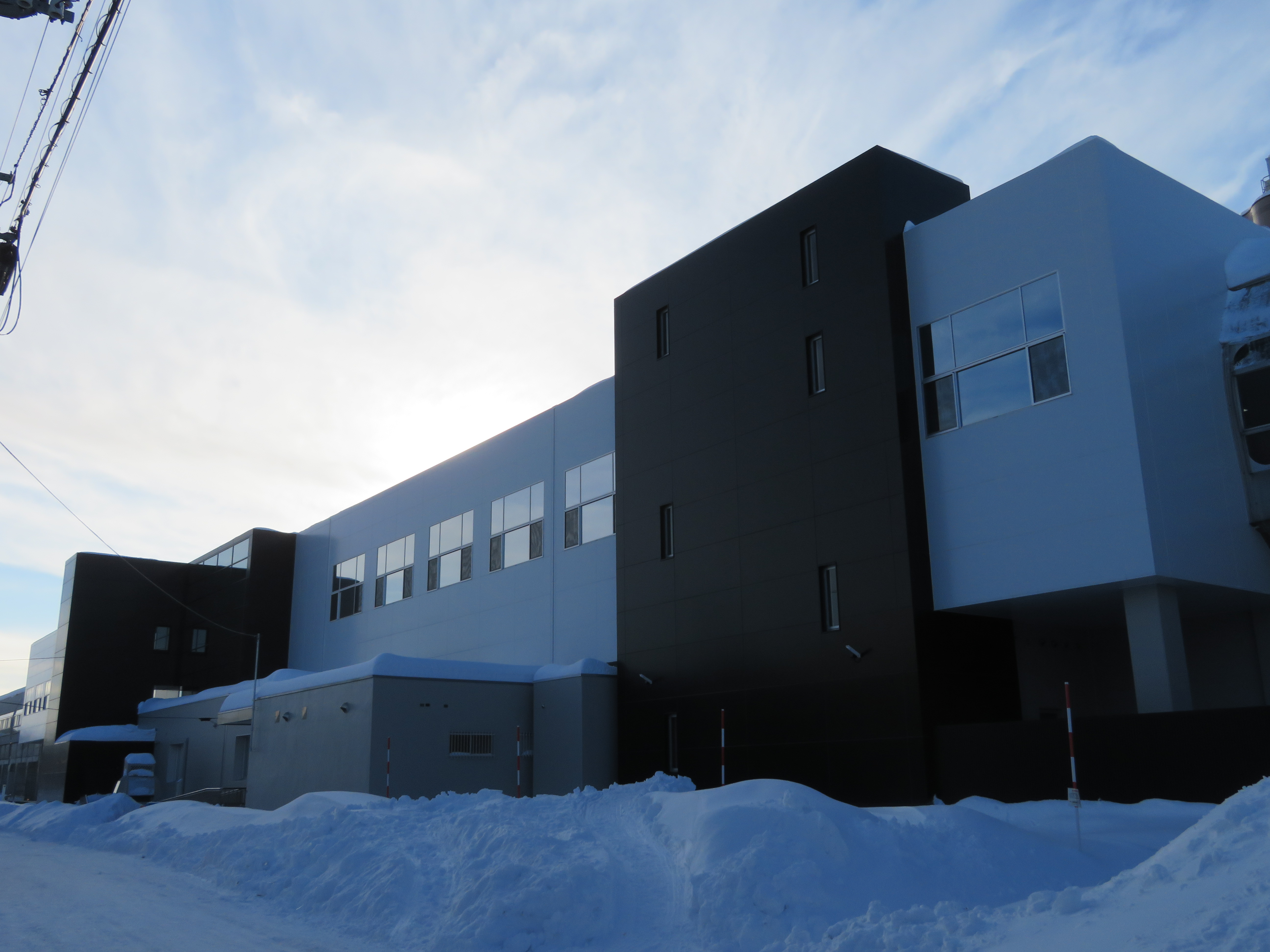 自衛隊前駅東出入口